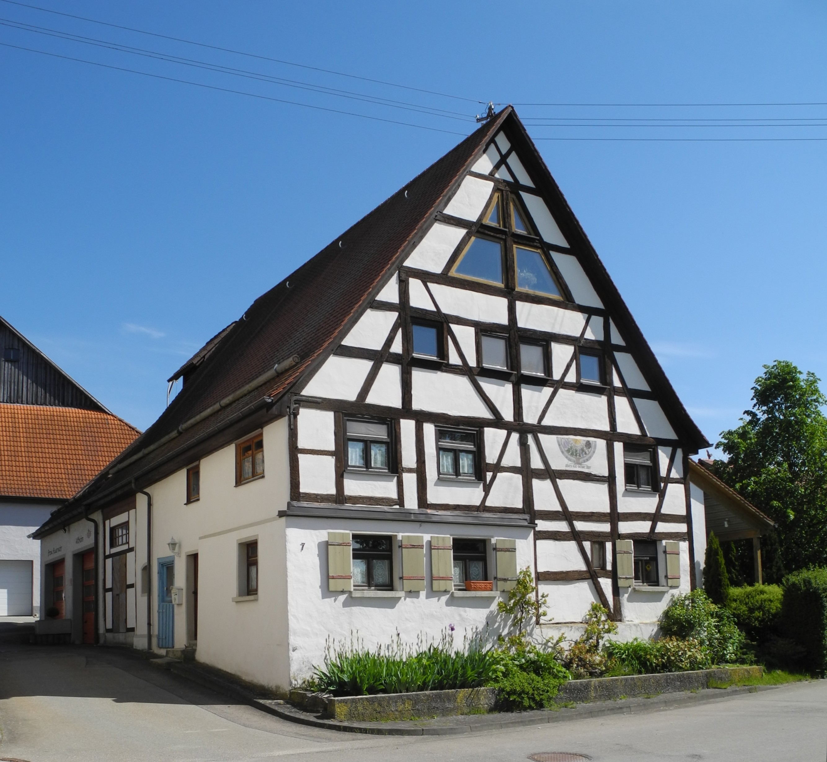 Altheim (bei Ehingen) - Fachwerkhaus